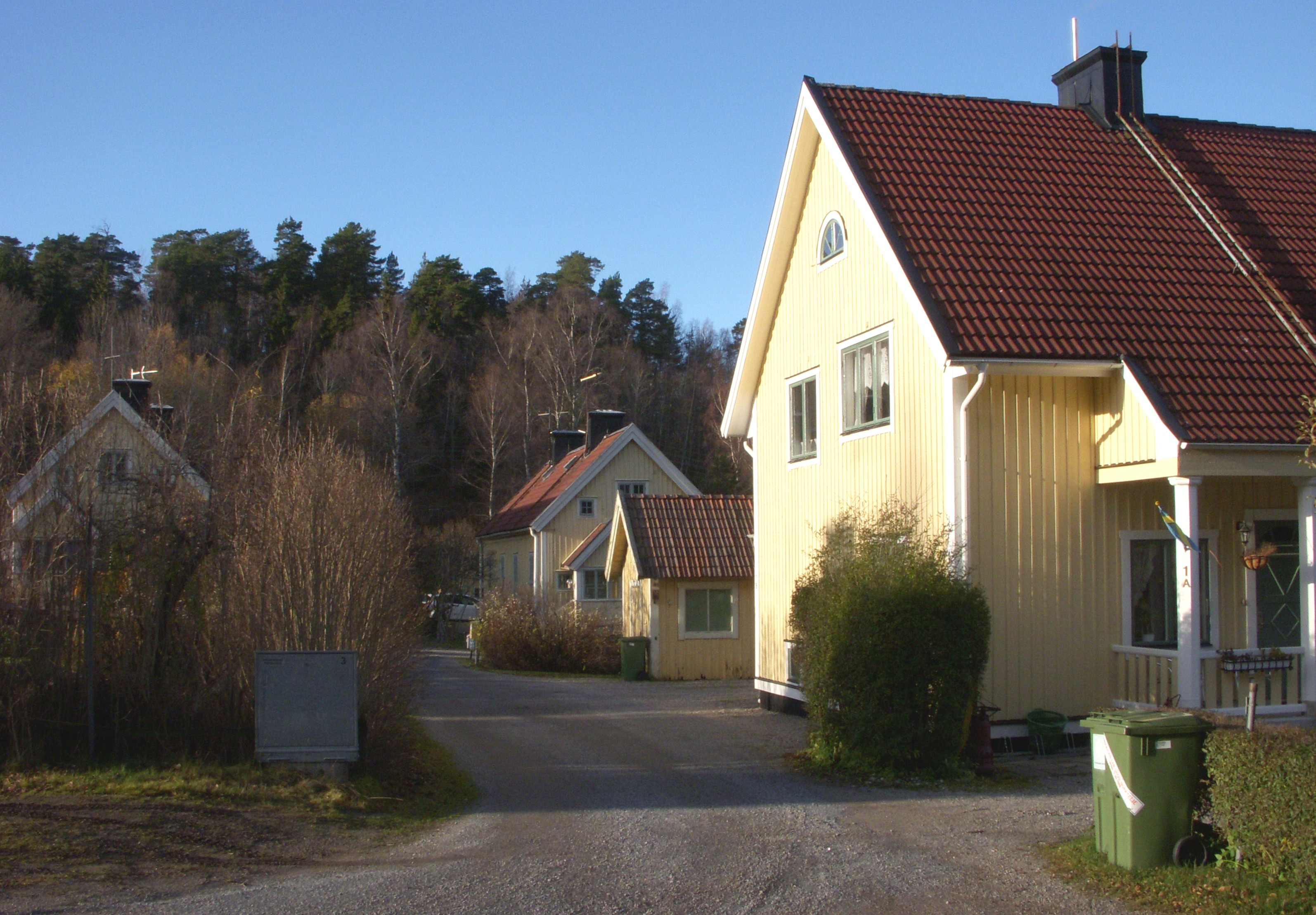 Arbetarebostäder "Gråbo" vid Norsborgs vattenverk